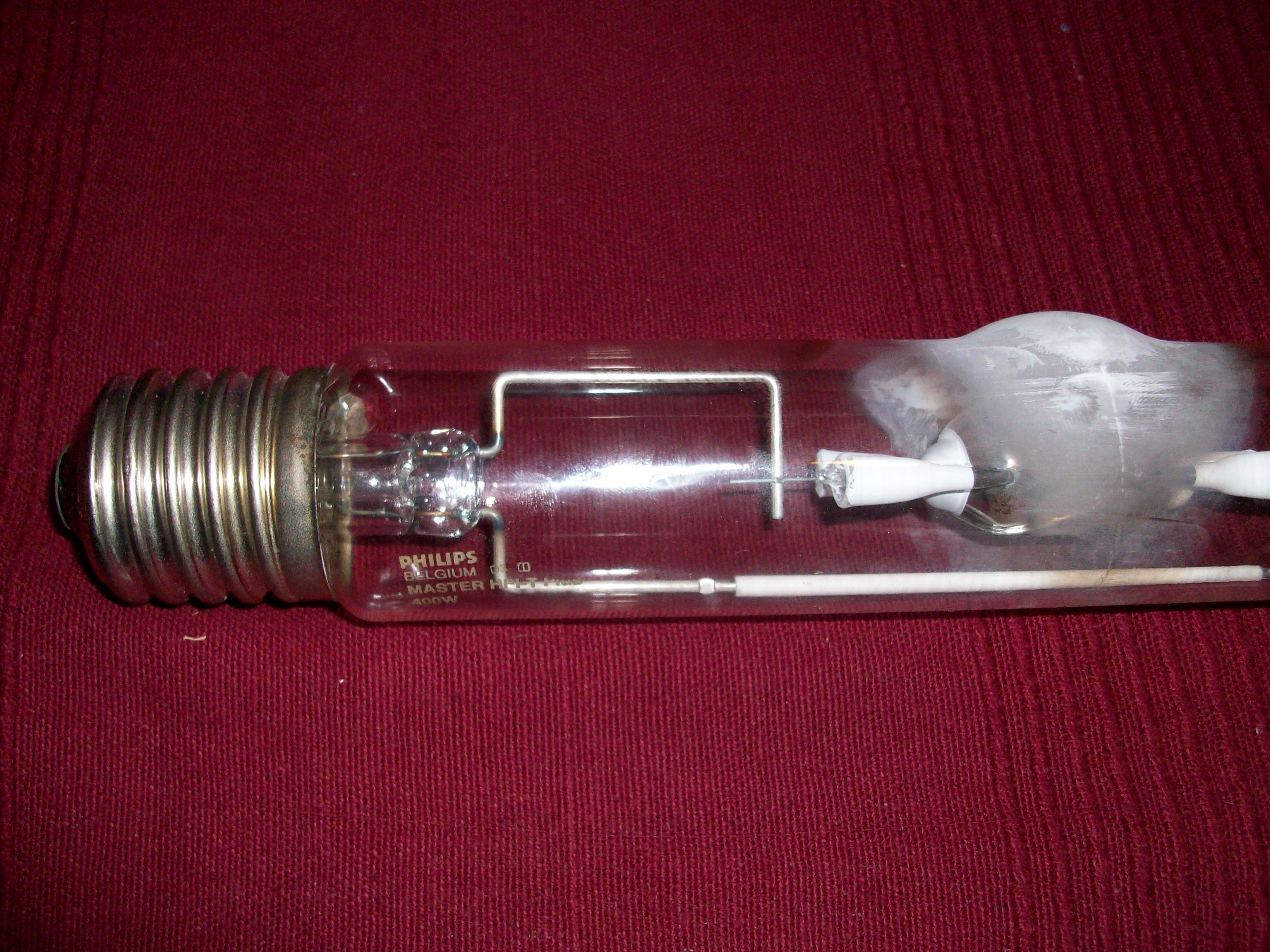 Lampada alogena 400w fusa attacco E40